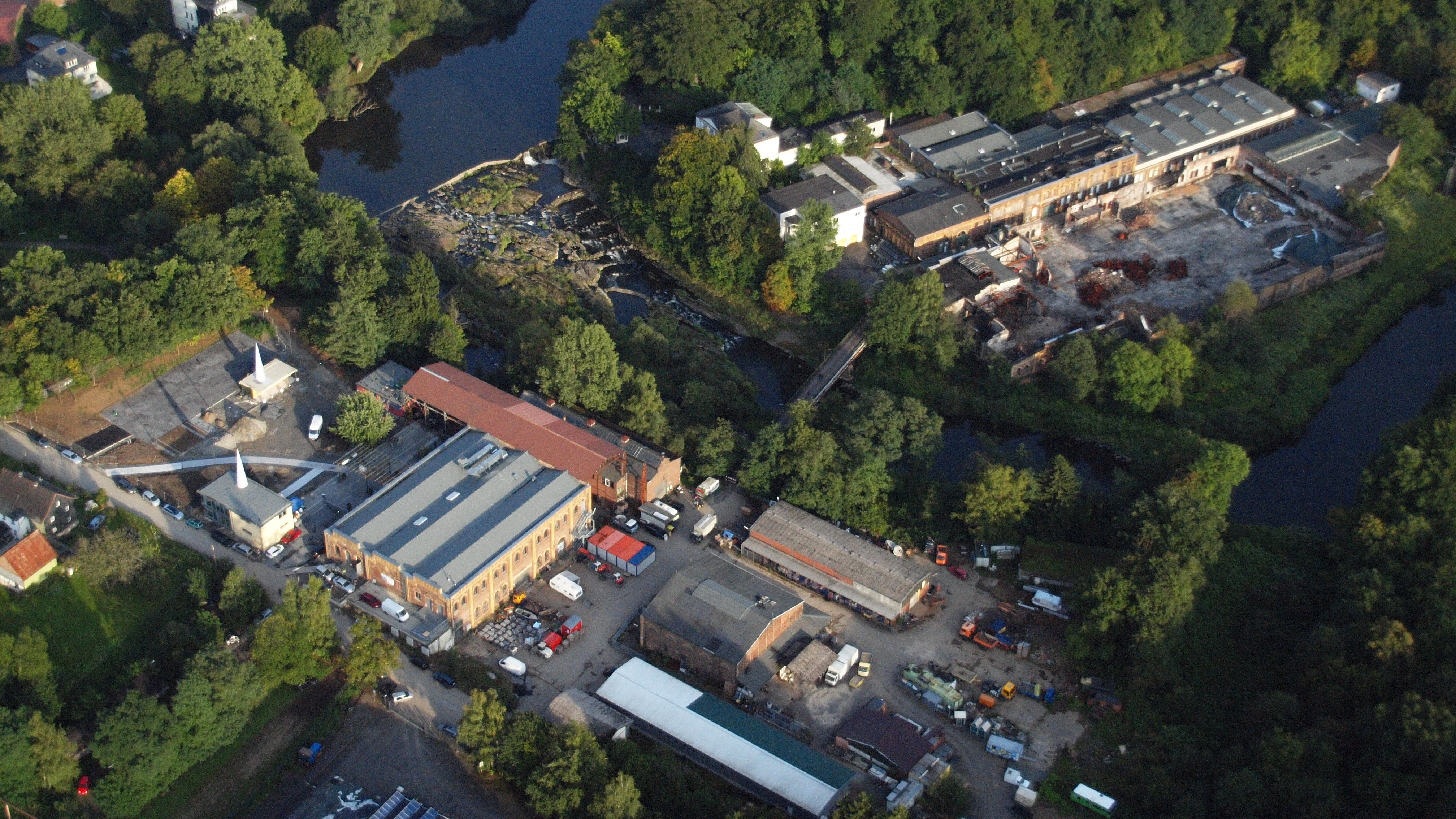 Elmore’s Werk, Schladern: Luftaufnahme